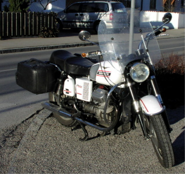 Bildbeschreibung: Moto Guzzi V7 Special, Bj. 1970 Quelle: selbst fotografiert Fotograf/Zeichner: MartinHansV Datum: 3. Februar 2002 Sonstiges: ...